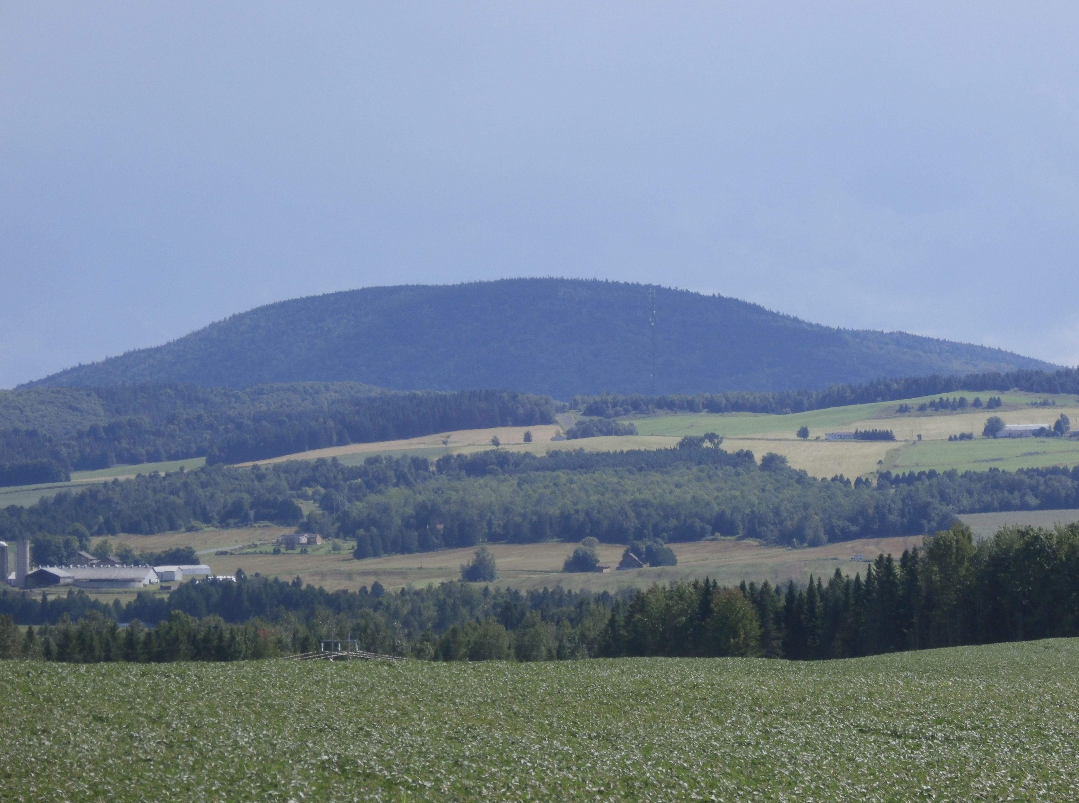 Les vallons agricoles près de Coaticook au pied du mont Barnston.